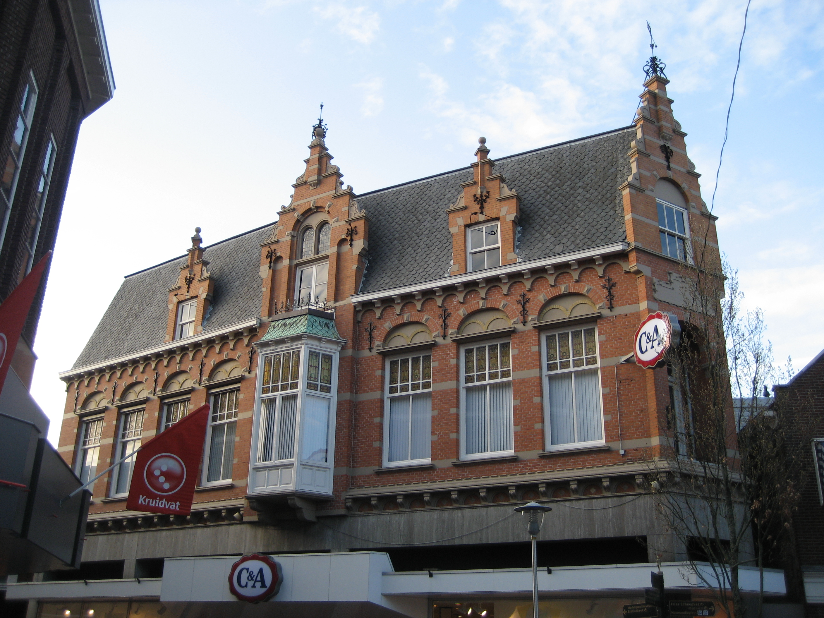 C & A Sneek Hooghuis Friesland, Nederland